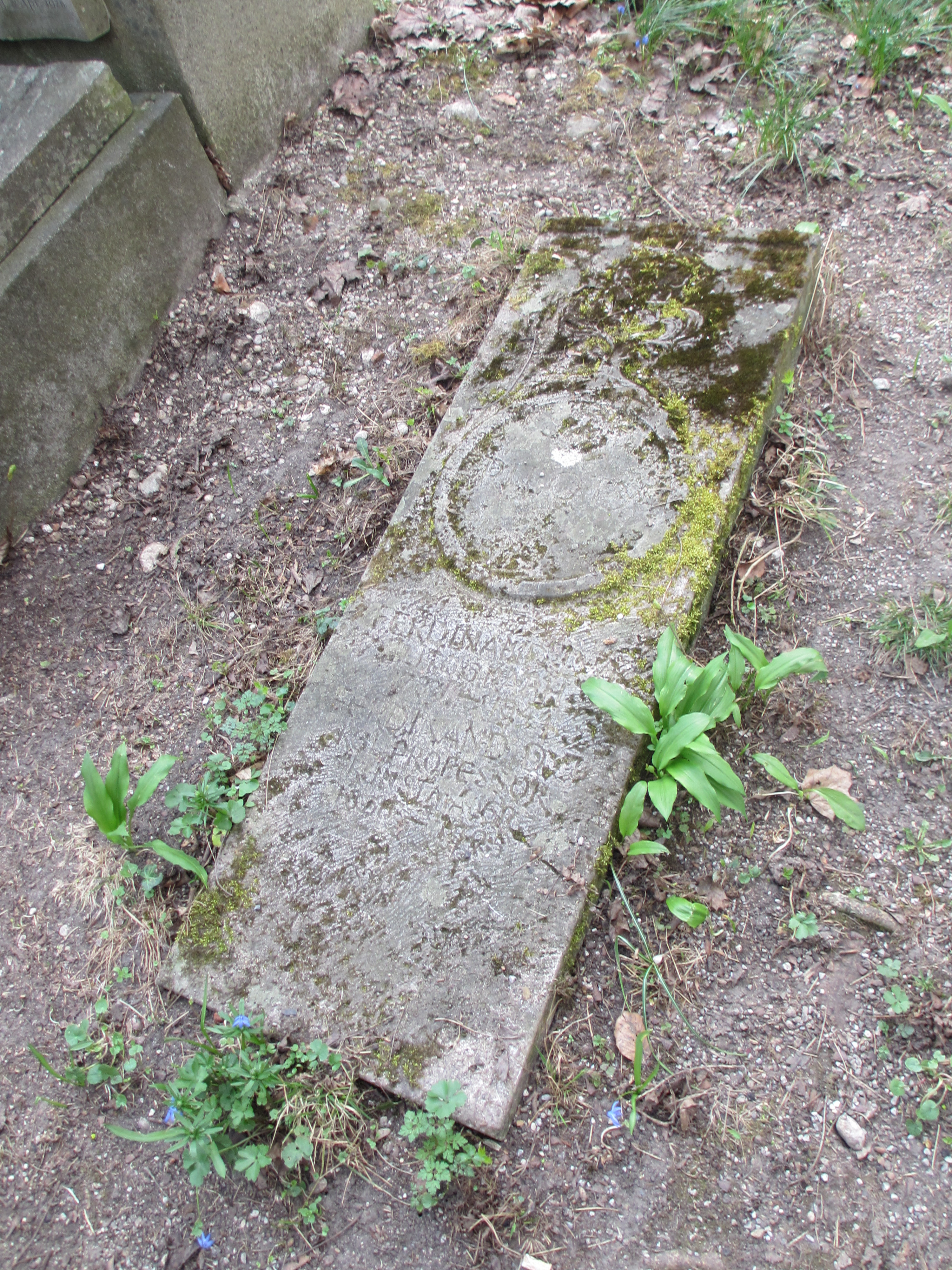 Grab von Ferdinand Pilot dem Älteren und Ferdinand Pilot dem Jüngeren auf dem Alten Suedlichen Friedhof in Muenchen-Graeberfeld GF-13-2-1